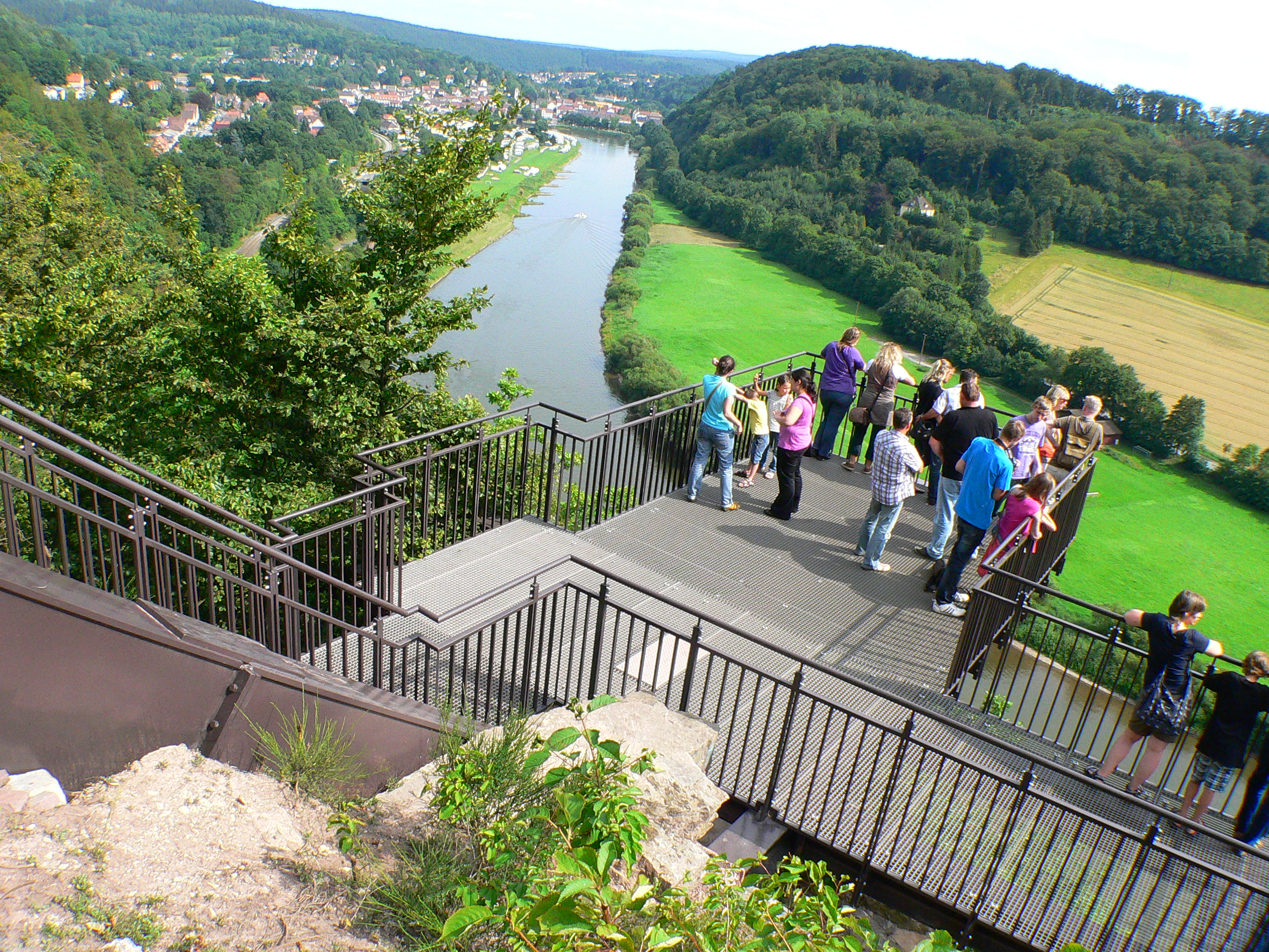 Der 2011 auf der zweiten Hannoverschen Klippe montiere "Weser-Skywalk" oberhalb der Weser bei Bad Karlshafen.